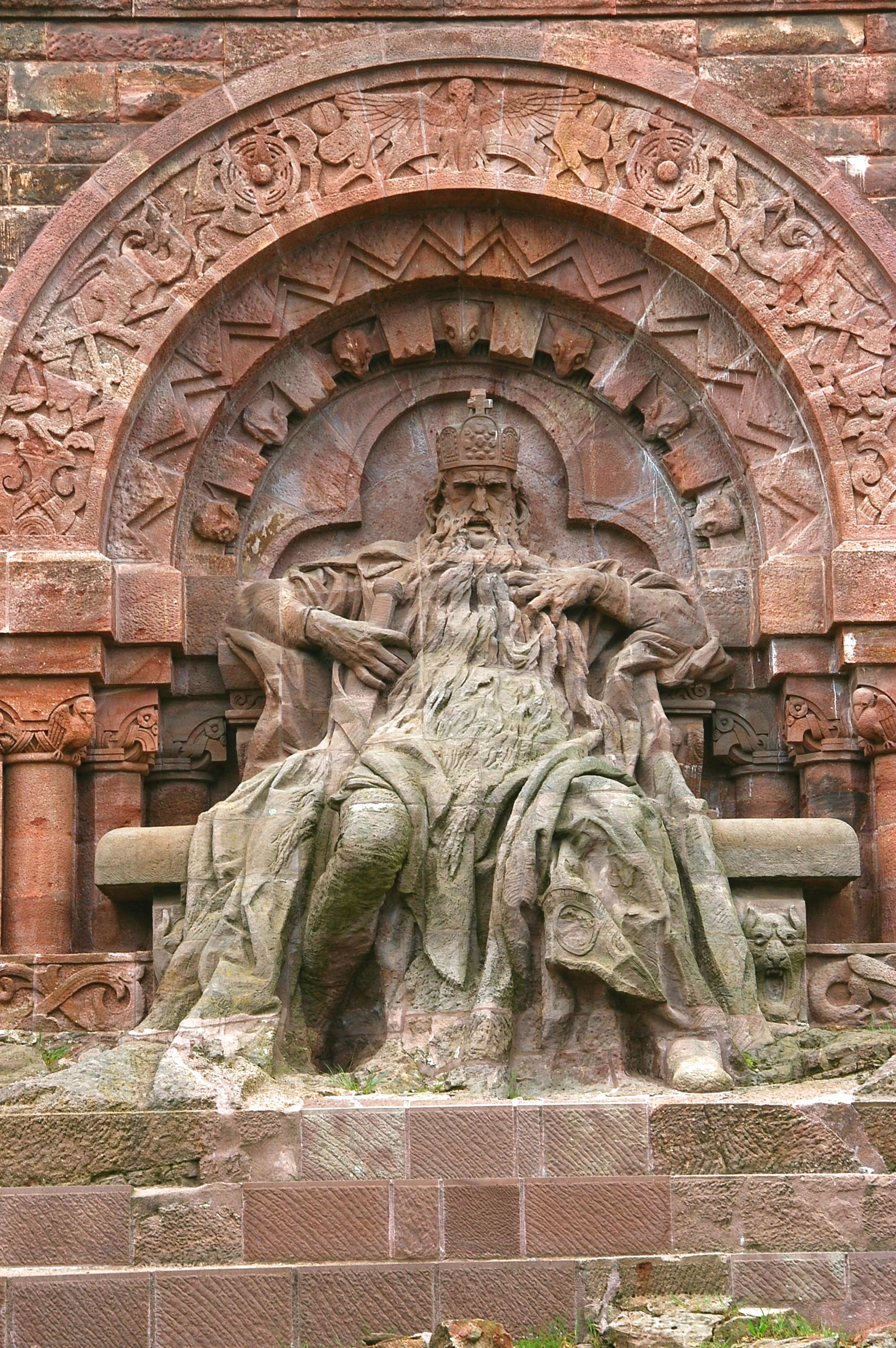 Kyffhäuser - Barbarossa gesamt